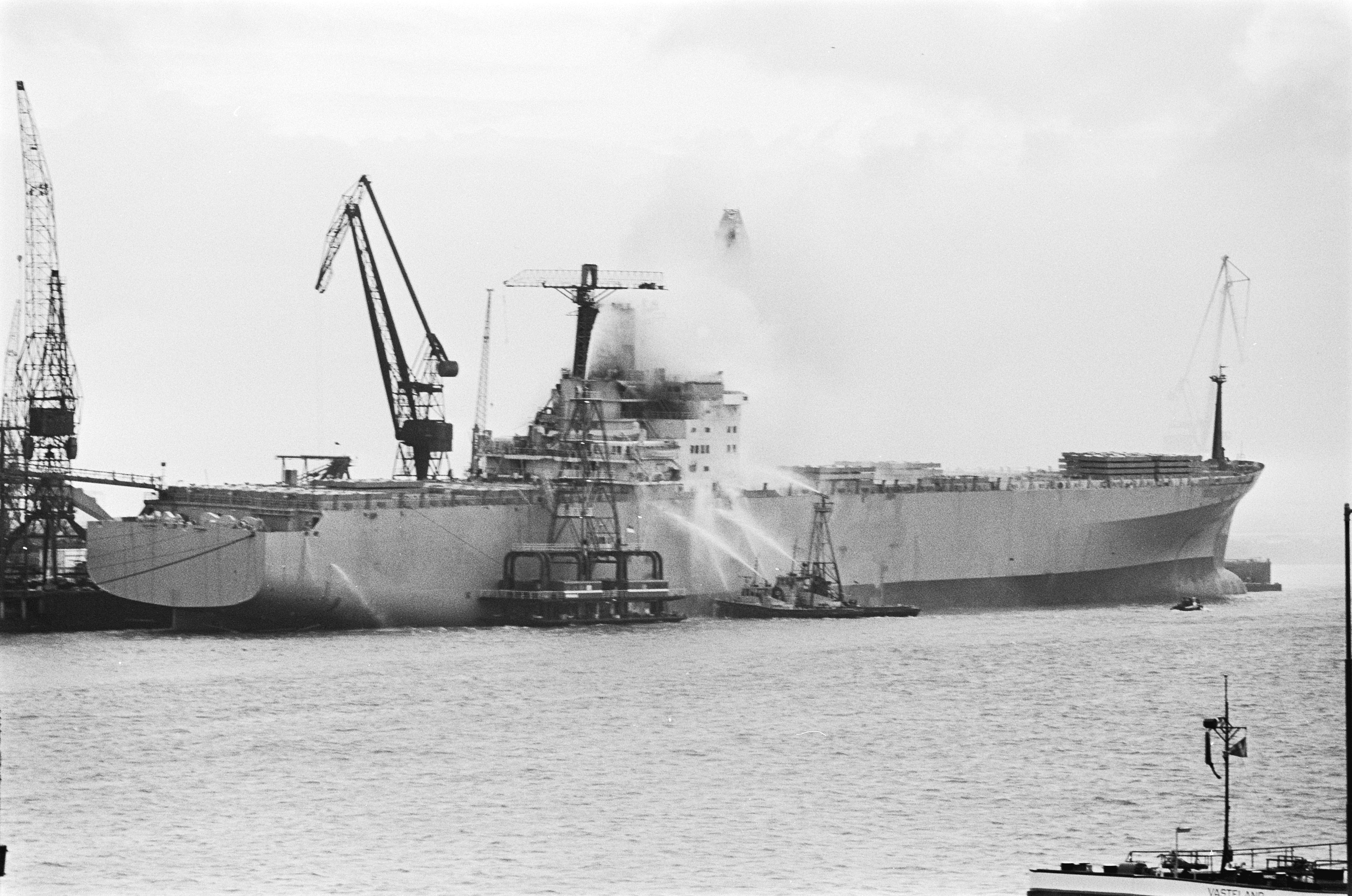 Collectie / Archief : Fotocollectie Anefo Reportage / Serie : [ onbekend ] Beschrijving : Brand in nieuw containerschip "Nedlloyd Hoorn" in Botlek, Rotterdam Datum : 24 januari 1978 Locatie : Rotterdam, Zuid-Holland Trefwoorden : branden, containerschepen Fotograaf : Suyk, Koen / Anefo Auteursrechthebbende : Nationaal Archief Materiaalsoort : Negatief (zwart/wit) Nummer archiefinventaris : bekijk toegang 2.24.01.05 Bestanddeelnummer : 929-5405